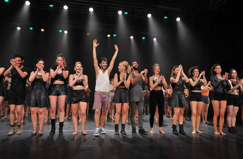 תמונת מחול